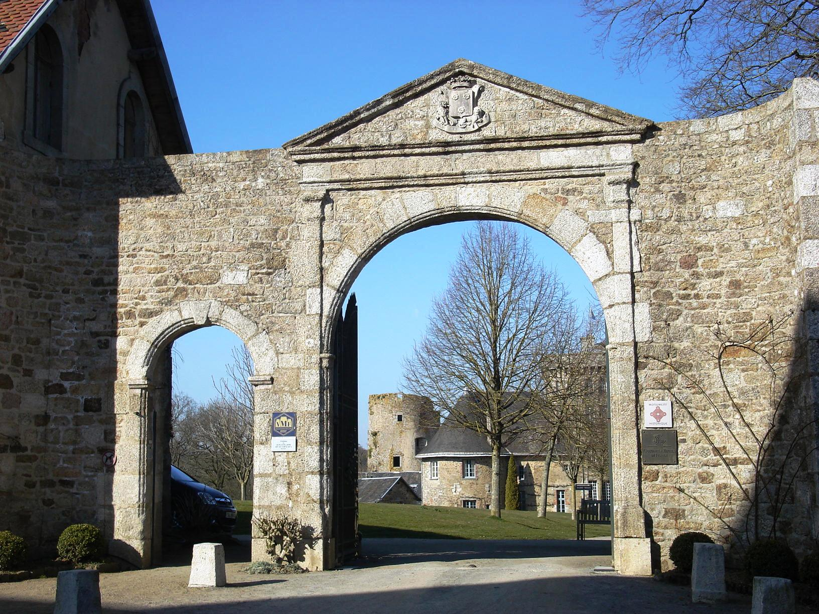 Château de la Flocellière